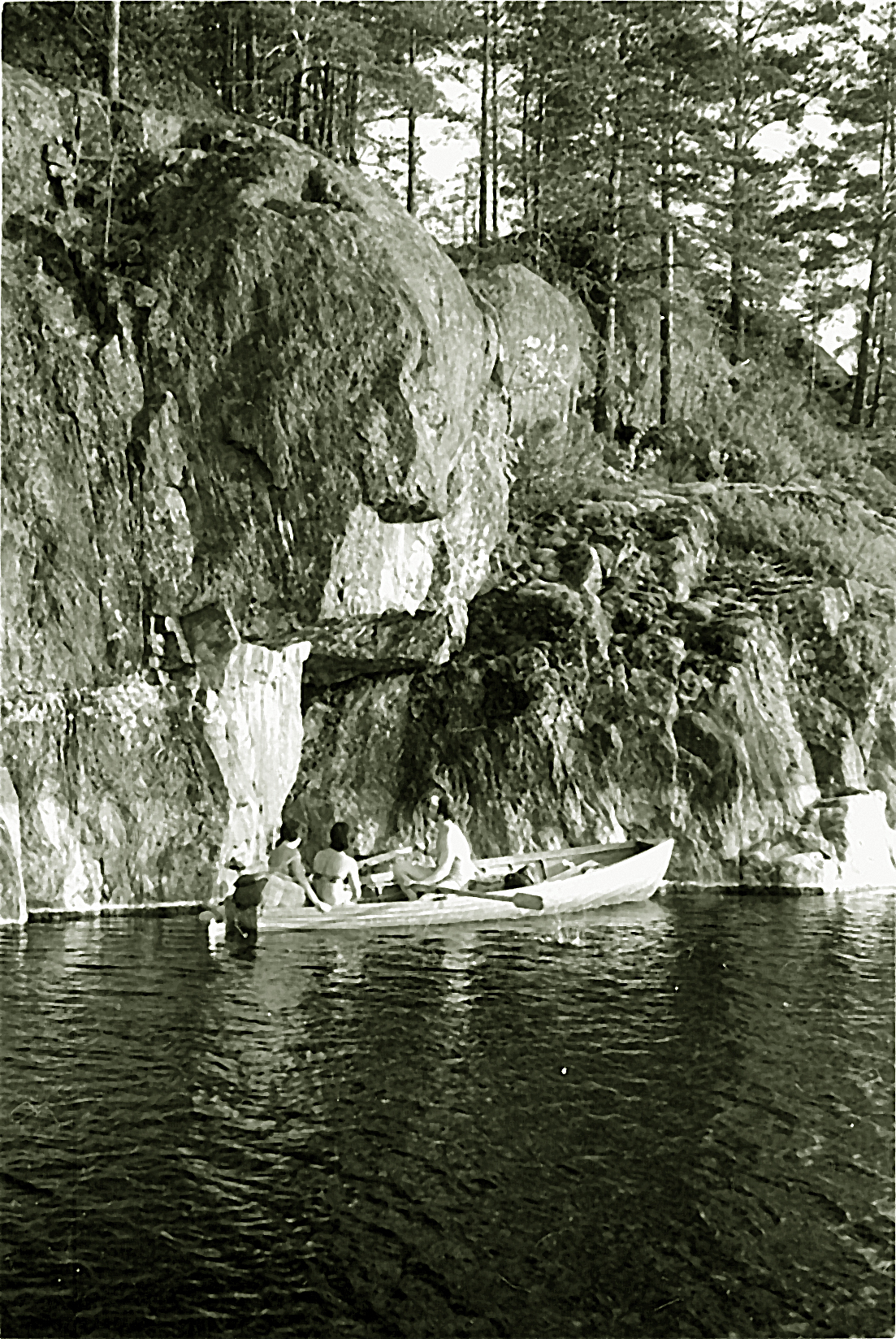 Ладожское озеро. Скальный берег.